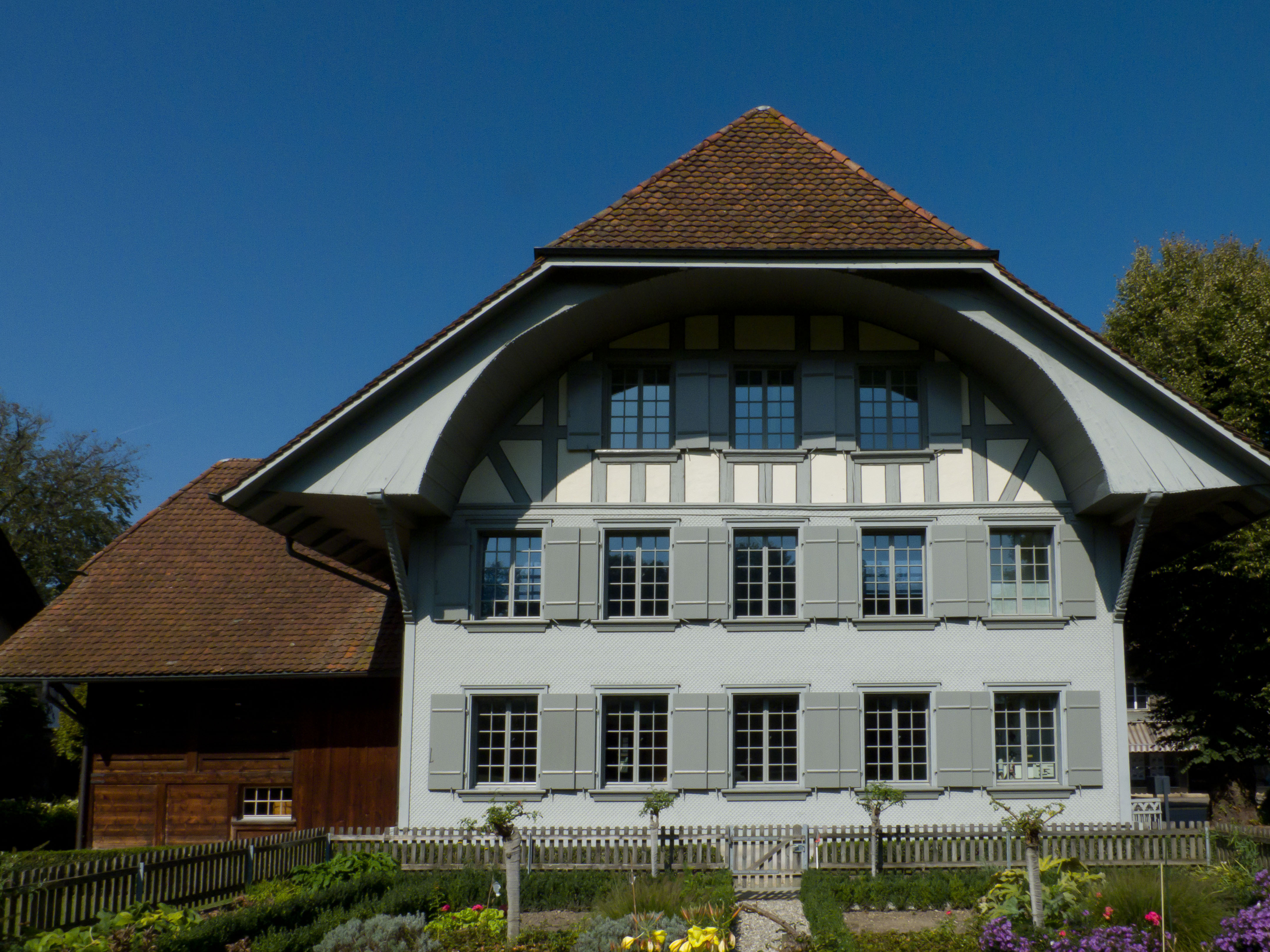 Aarwangen,Tierlihaus, Südfassade